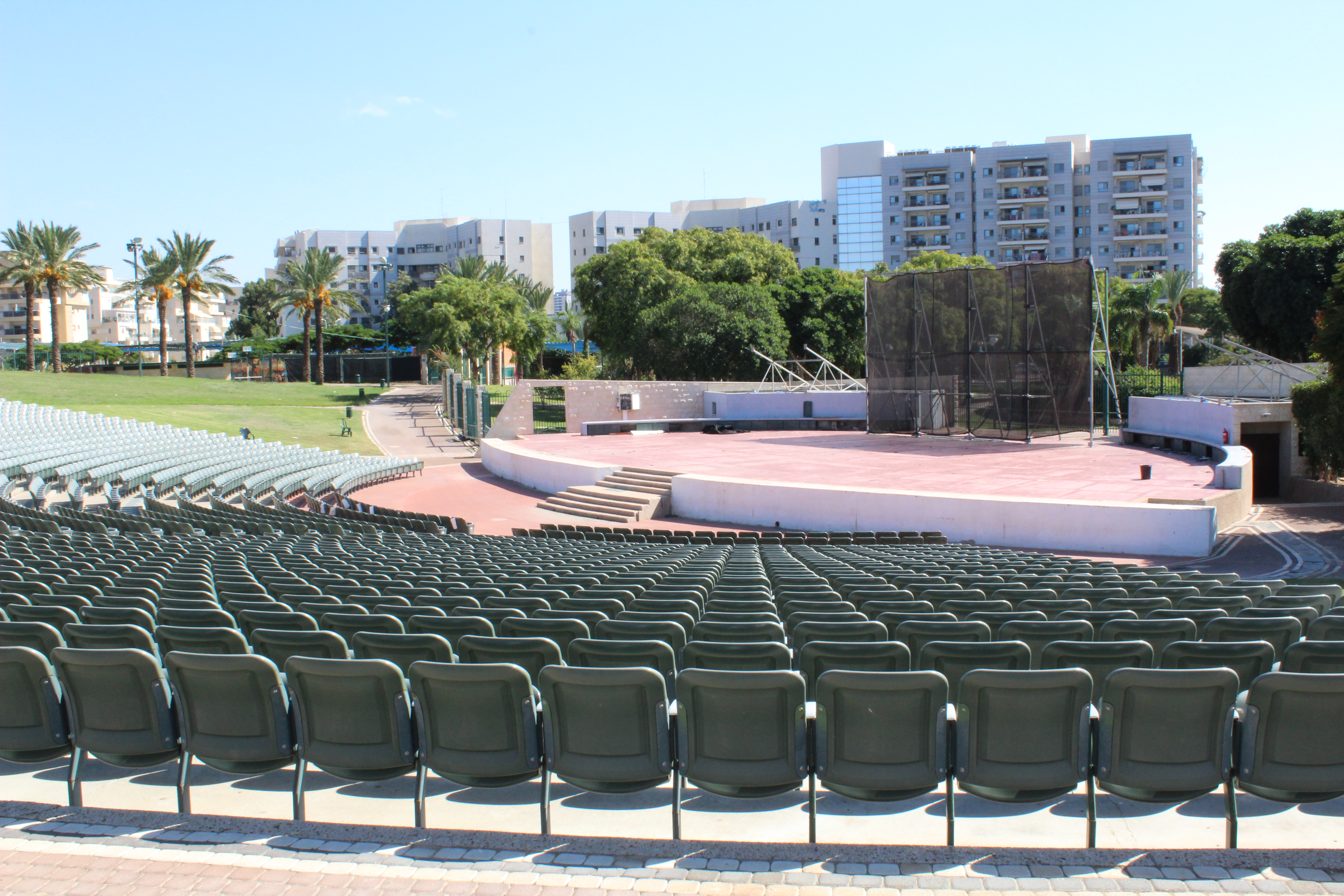 אמפי פארק מוצקין